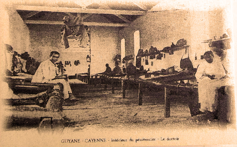 A Cayenne le dortoir du pénitencier